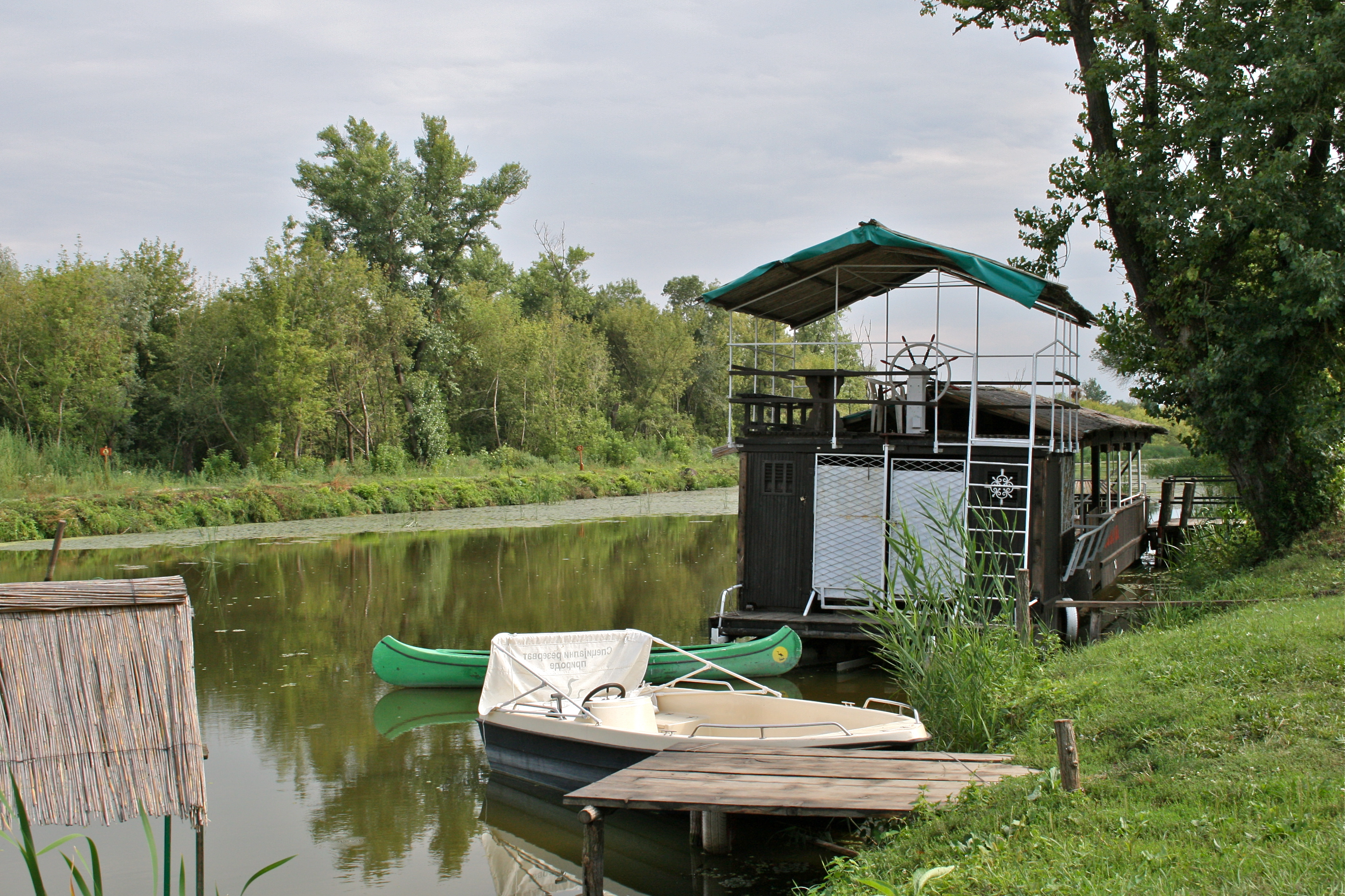 Пристаниште Царска Бара